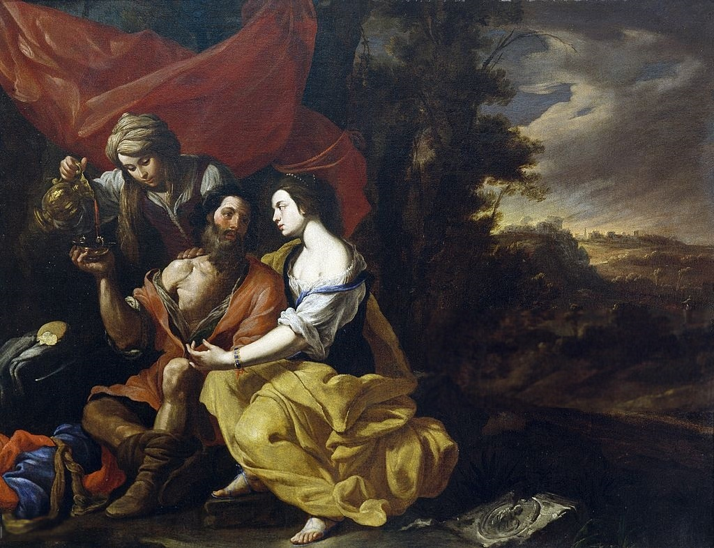 Lot e le figlie